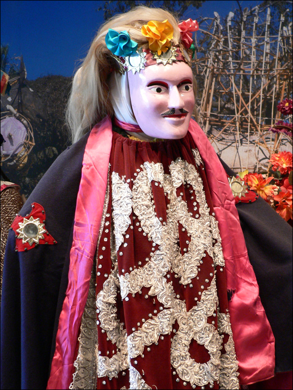 Masque traditionnel